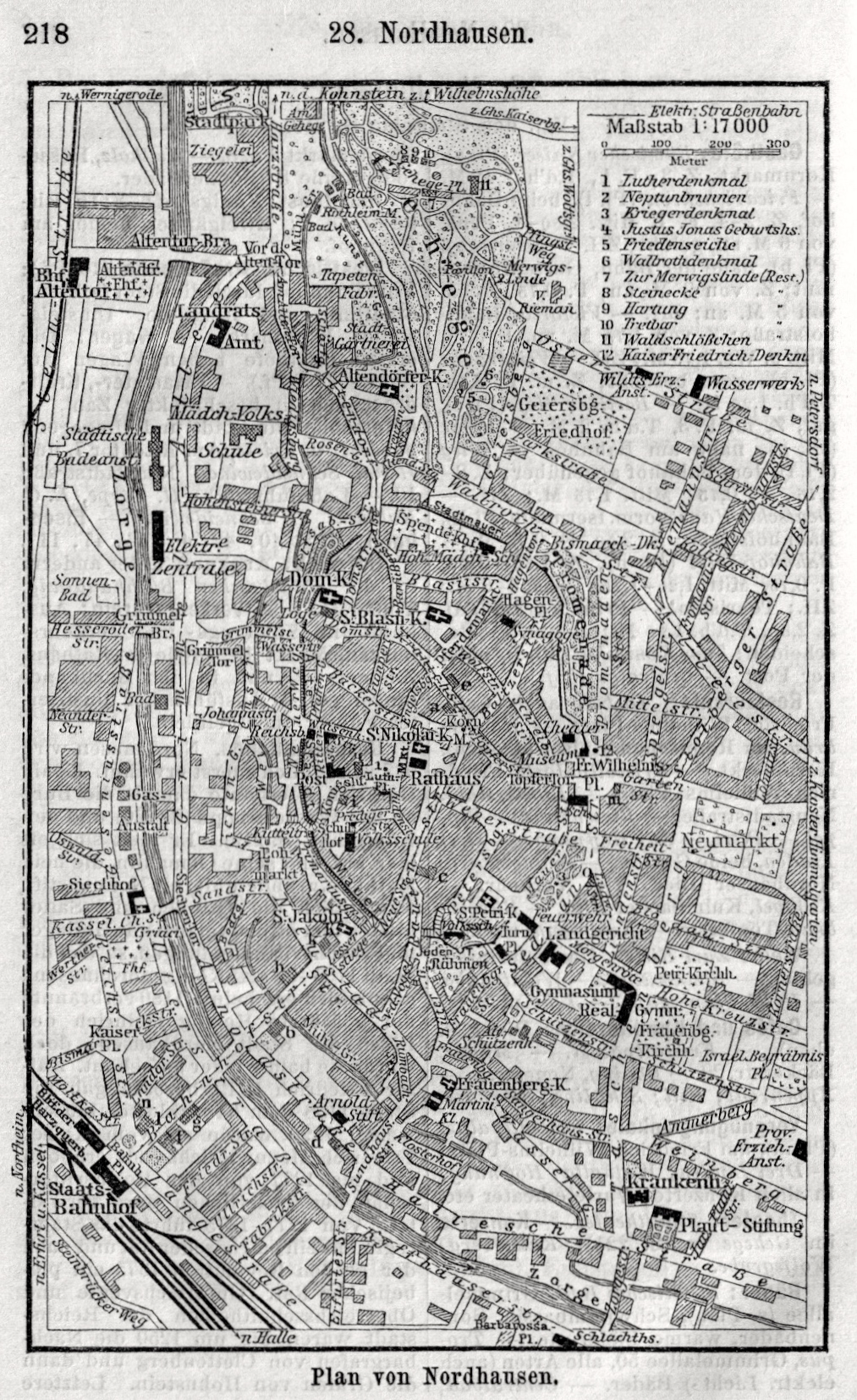 Plan von Nordhausen aus Meyers Reisebücher, Harz, 21. Ausgabe, 1912